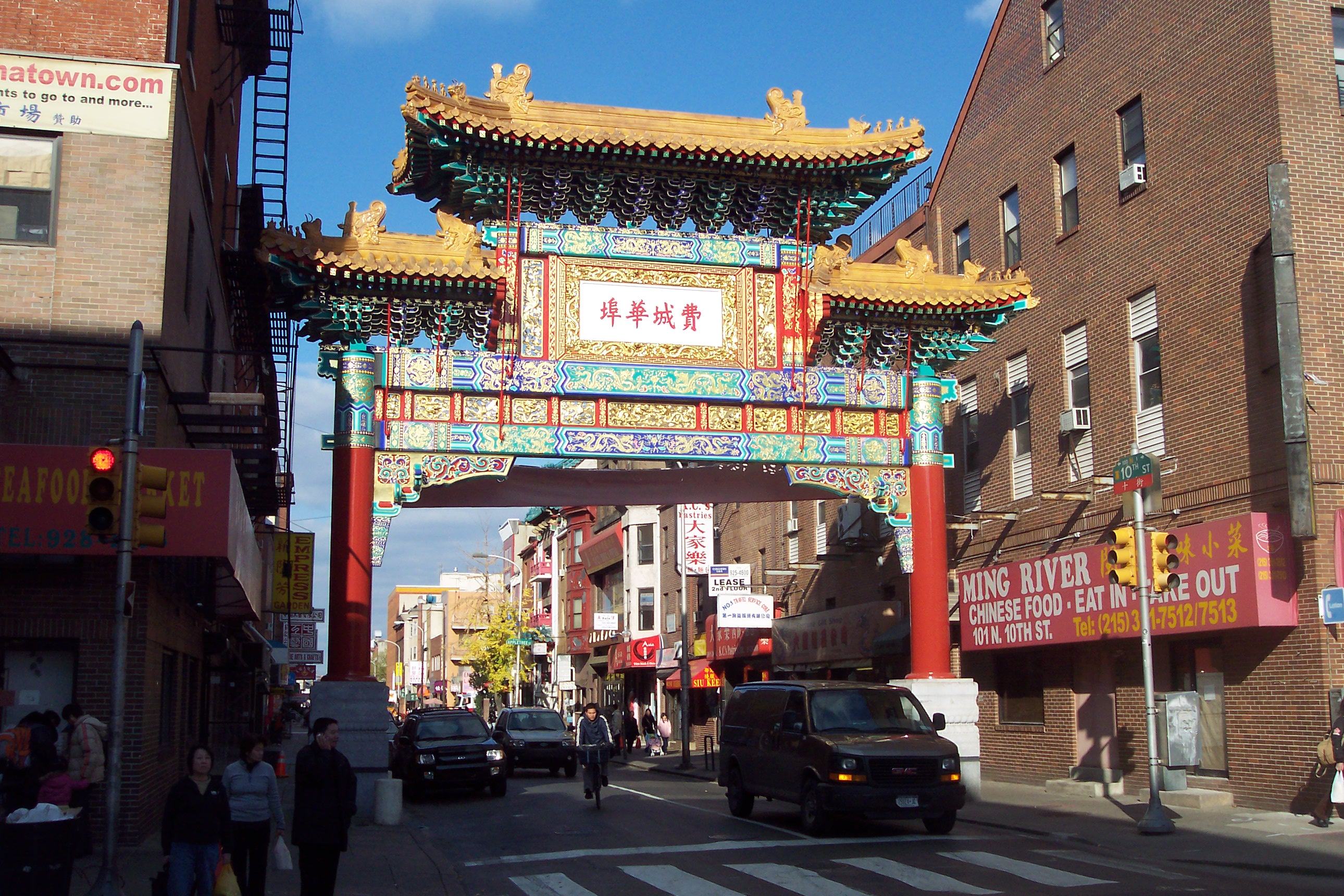 Philadelphia